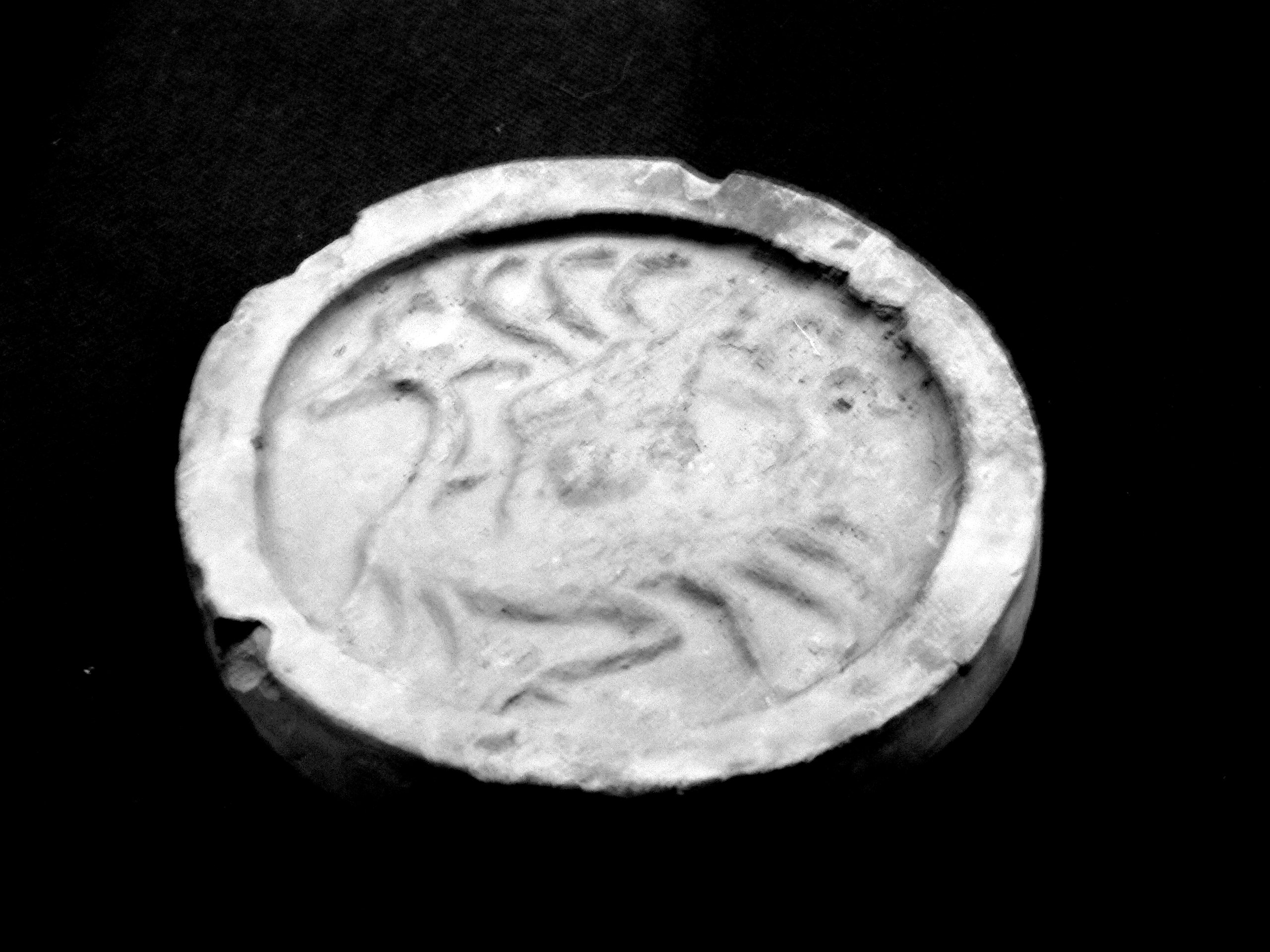 瓦当上的zh:朱雀 拍摄